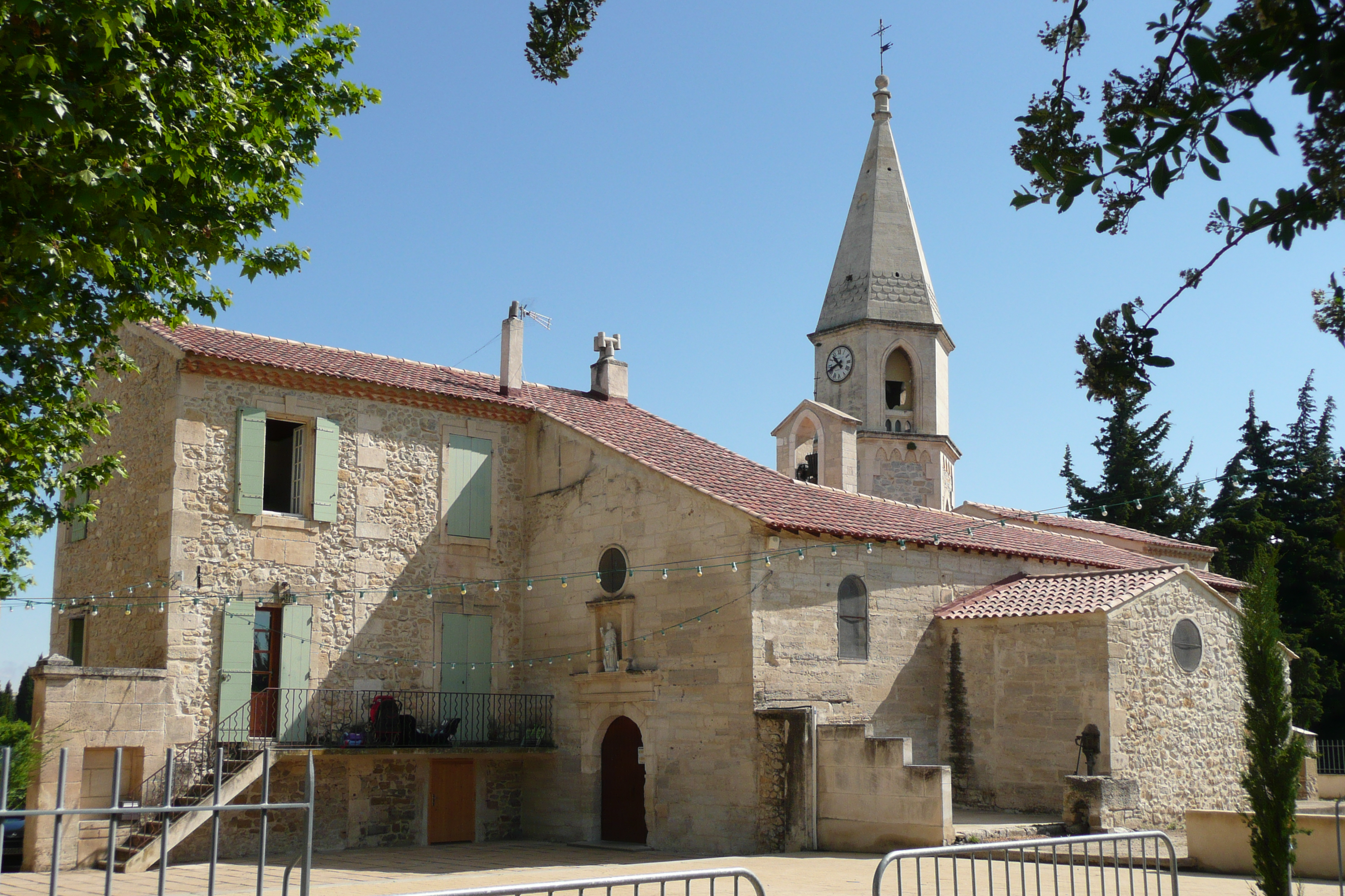 Eglise à Saint-Pierre-de-Mézoargues.